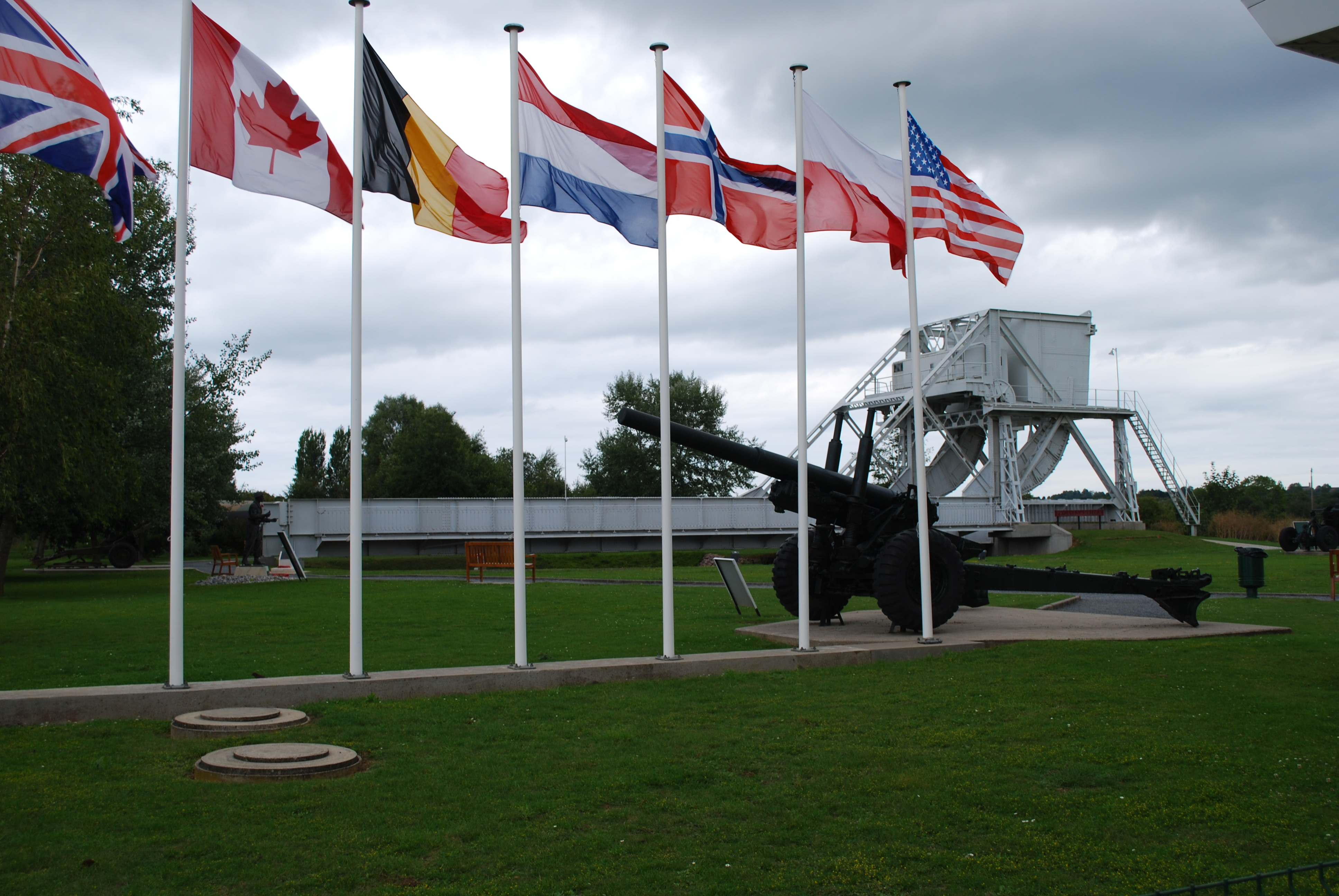 De originele Pegasusbridge